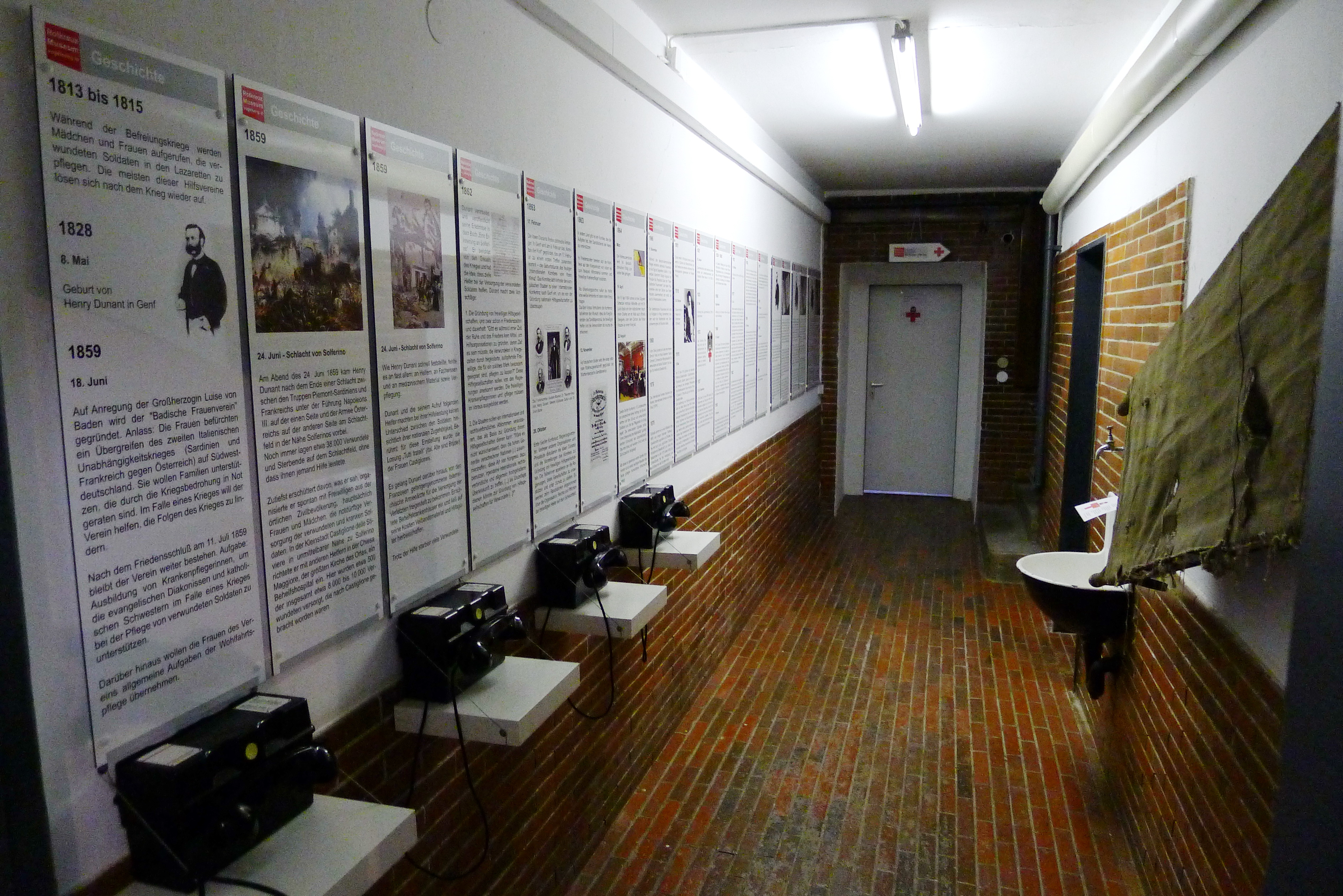 Die Zeitschiene über die Geschichte einer Idee mit umgebauten MP3 Feldtelefonen.